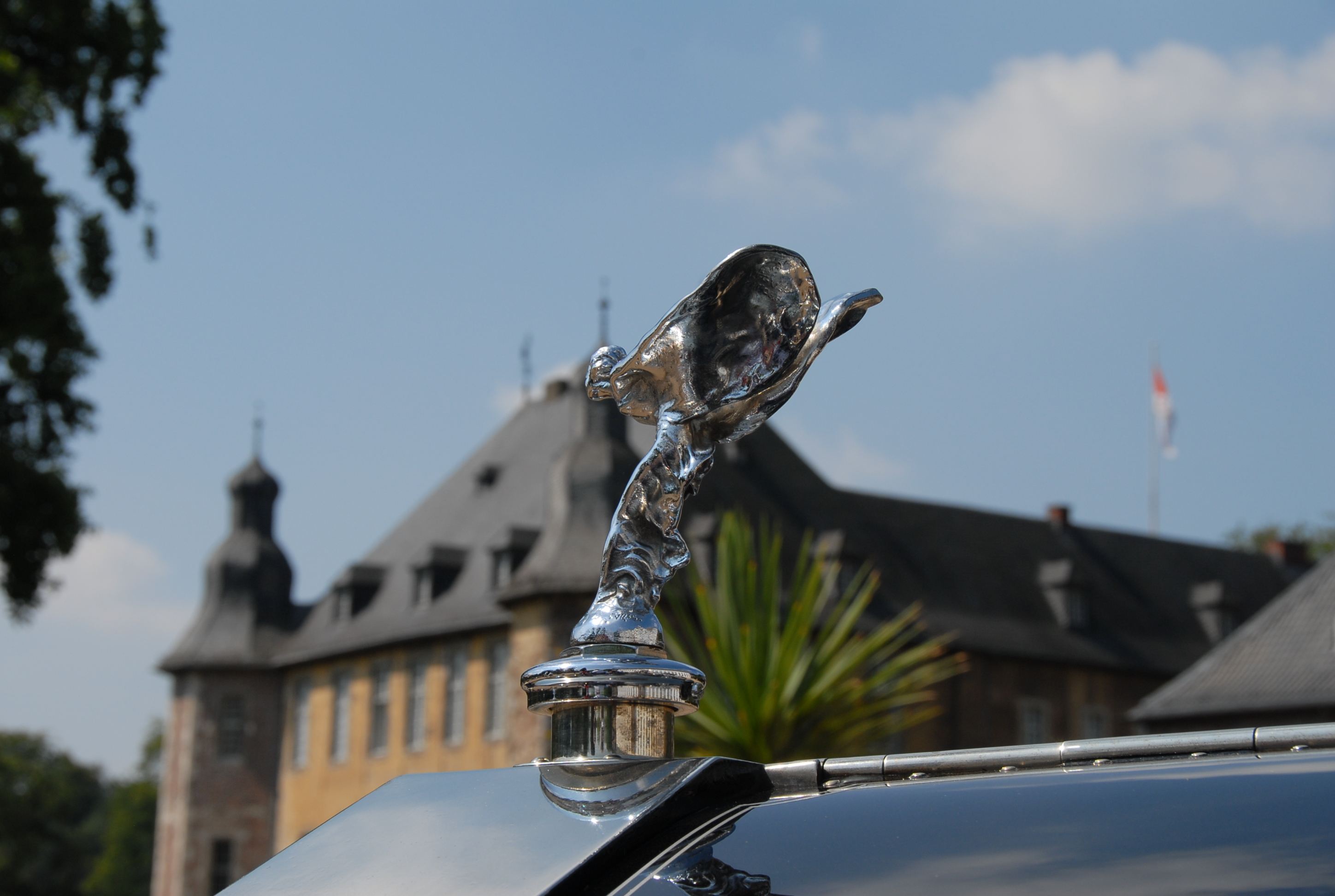 Classic Days 2007